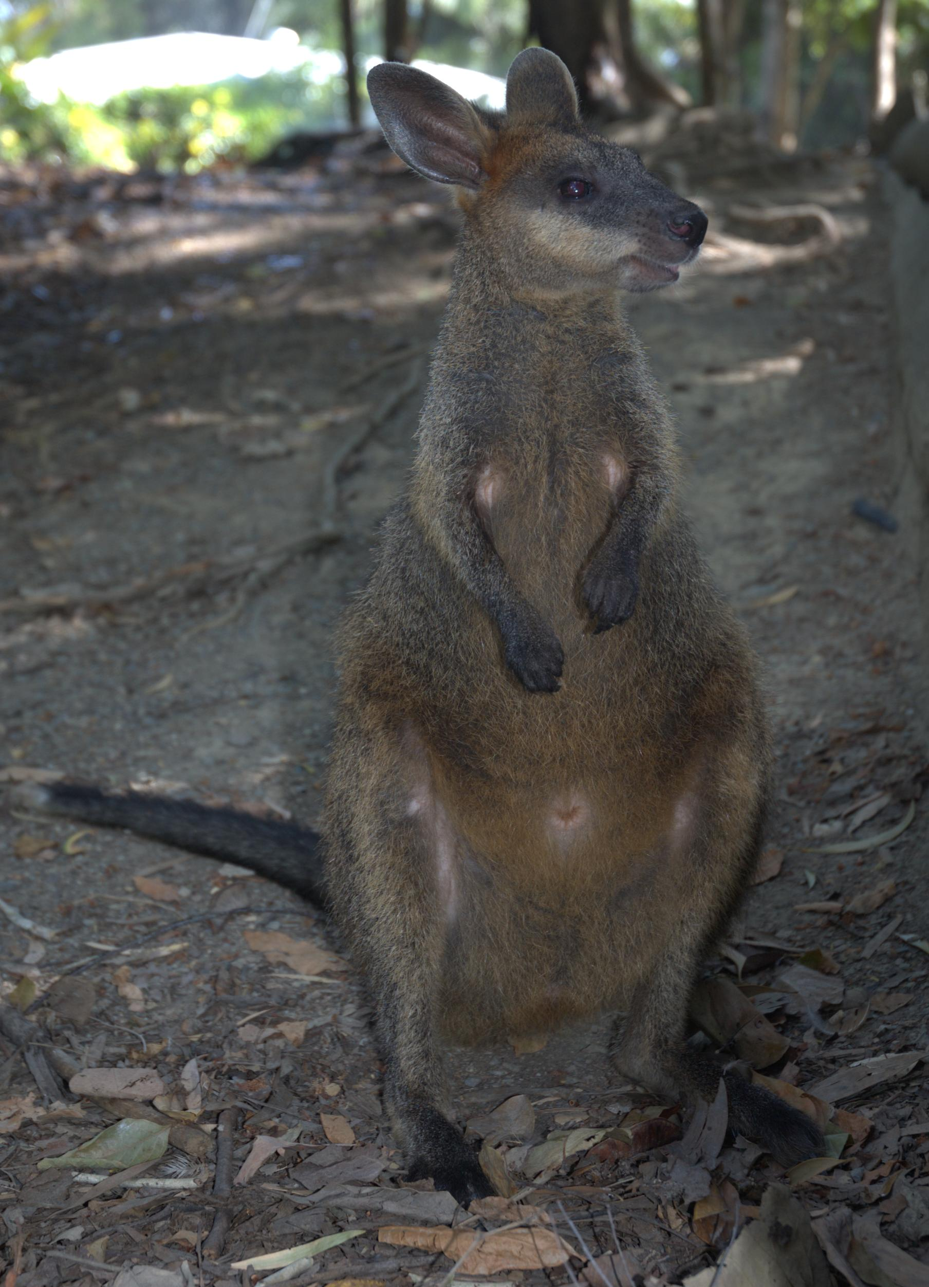 Болотний (Swamp or Black) валабі в Порт Дуглас, Квінсленд, Австралія.